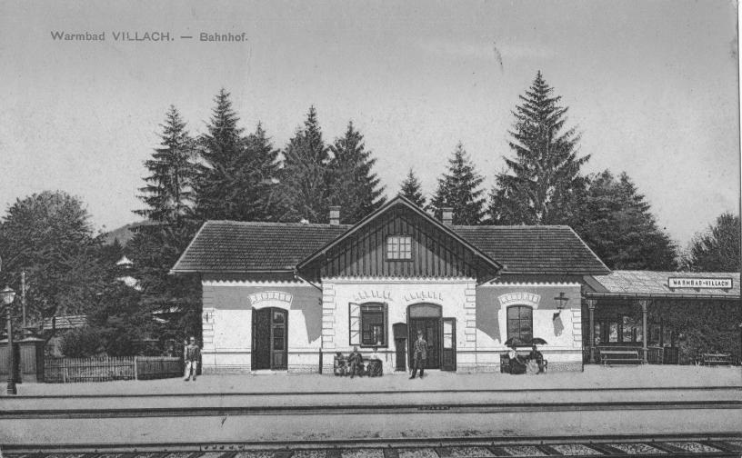 Aufnahmsgebäude des Bahnhofs Villach Warmbad von der Gleisseite 1913